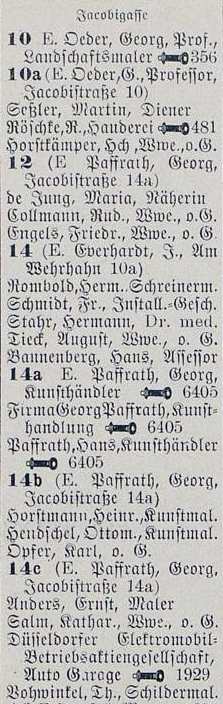 Jacobistraße in 1910: Eigentümer Georg Oeder Nr. 10, 10a; Eigentümer Georg Paffrath Nr. 12, 14a, 14b, 14c